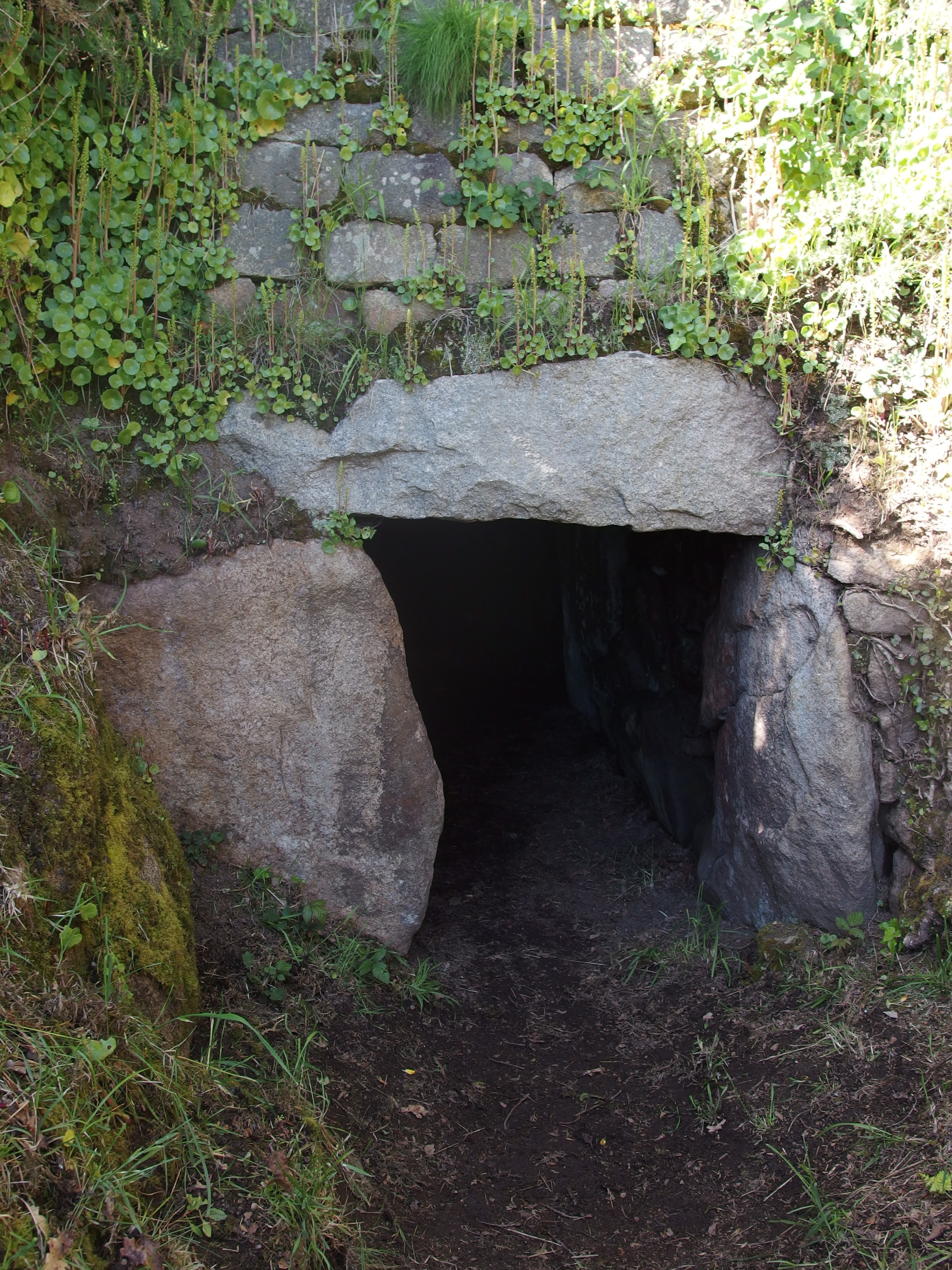 Entrée du Tumulus du Moustoir à Carnac